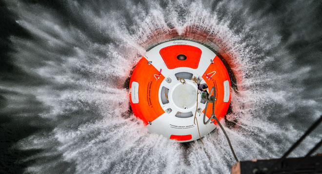 Бросковые испытания капсулы Tycho Deep Space